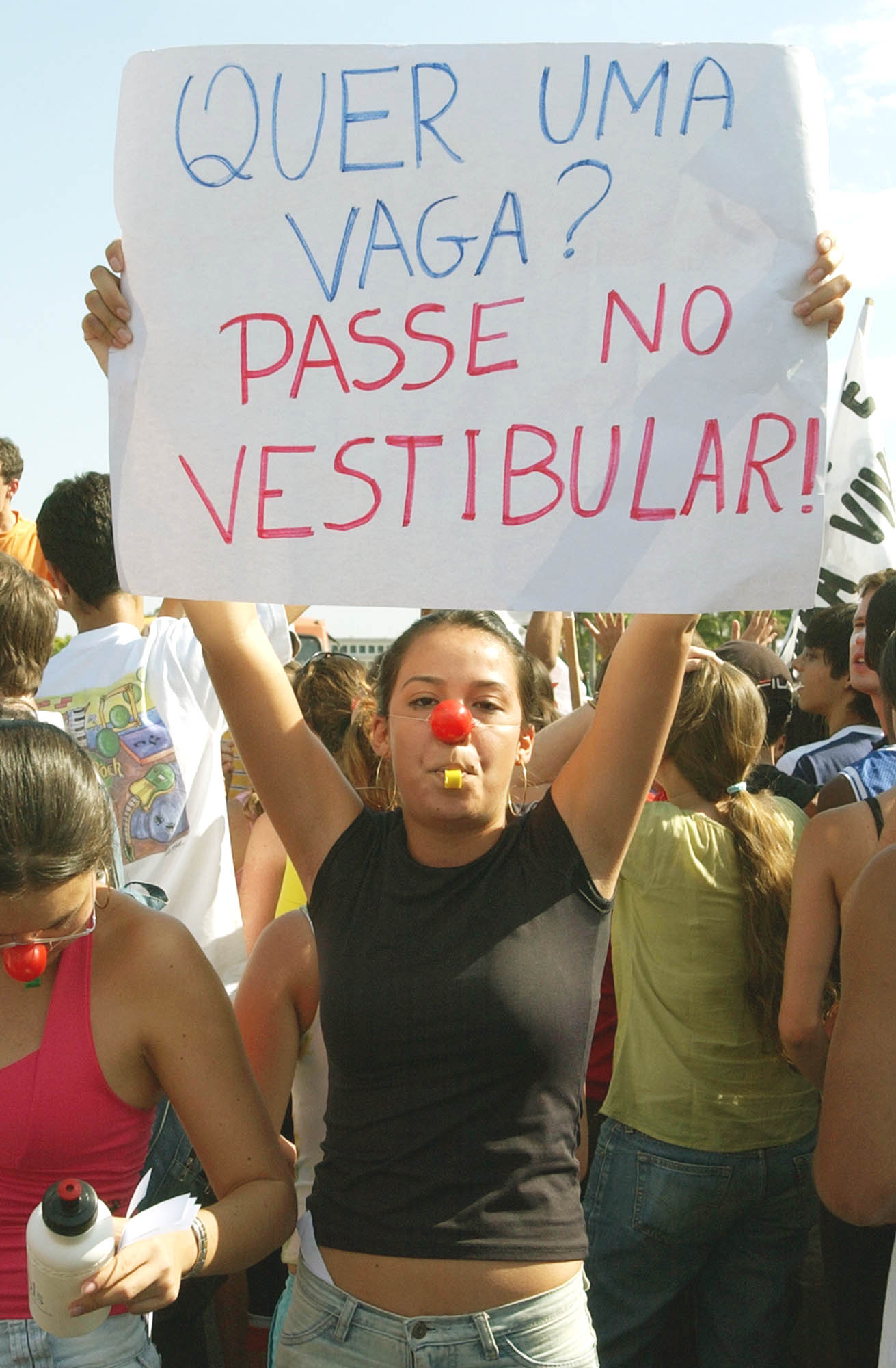 Estudantes fazem manifestação contra o sistema de cotas para o acesso a vagas em universidades.